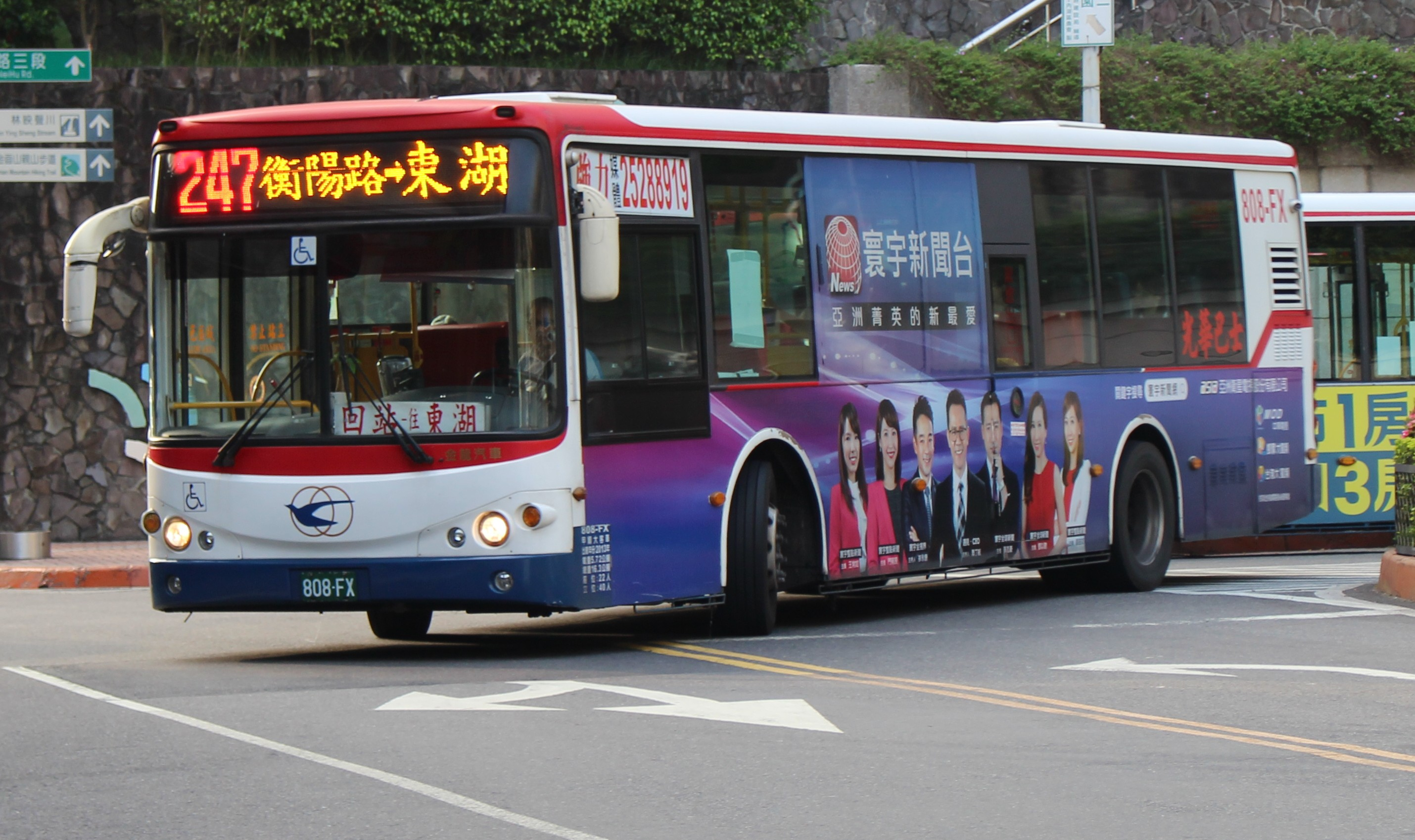 光華巴士2013 KINGLONG KL6112U1 808-FX 247